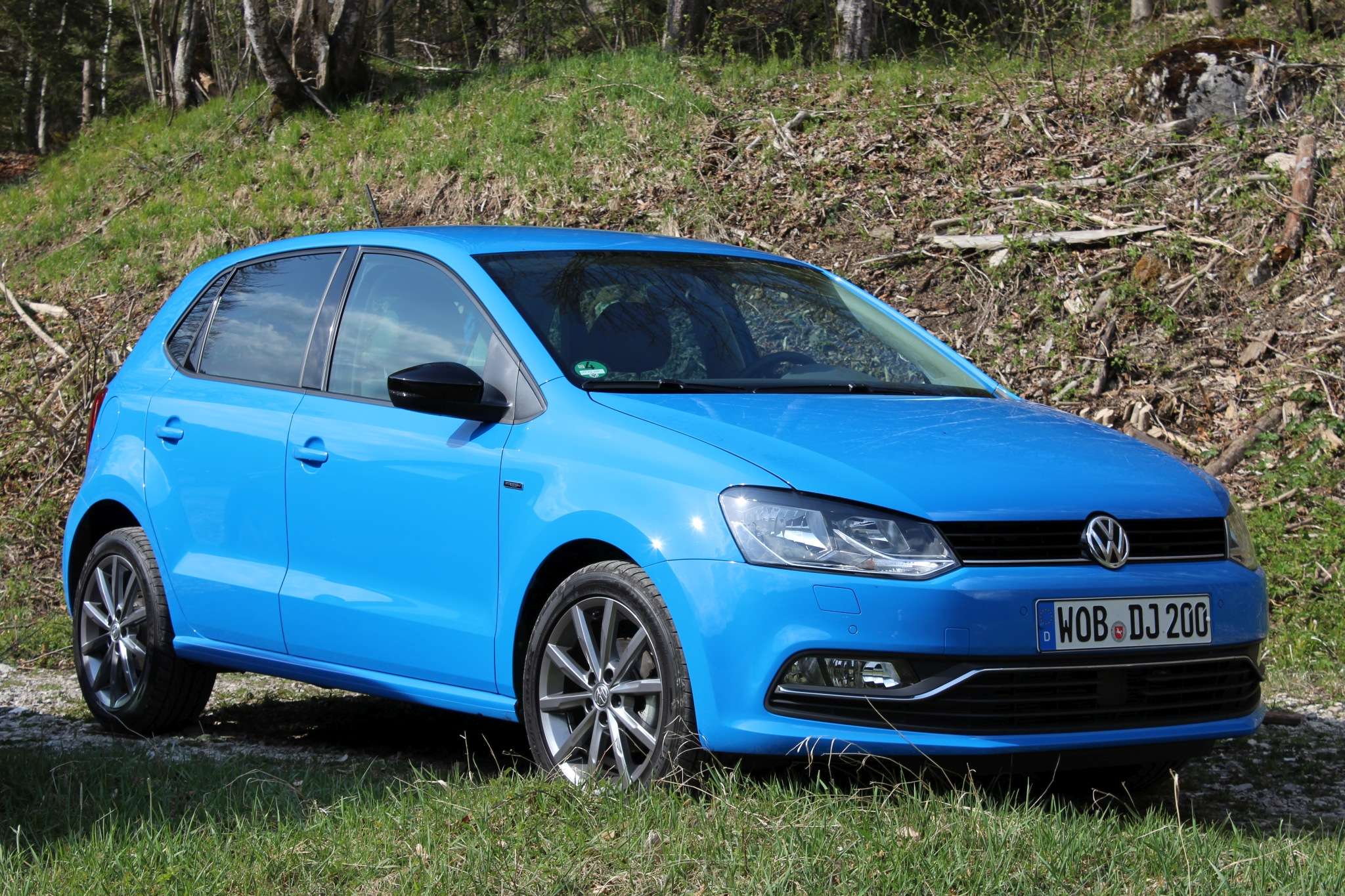 Facelift of VW Polo 2014 meistens gezeigt: VW Polo Bluemotion 1.2 TSI 7 Gang DSG Automatik 66 KW (9o PS) Ausstattungsvariant "Polo Fresh" (nur bis Ende 2014 verfügbar) Leergewicht 1.107 Kg max. 1.620 - 1.650 Kg Höchstgeschw. 186 KM/h Beschleunigung 7,1s oder 10,8 (Manuelle Schaltung / DSG)